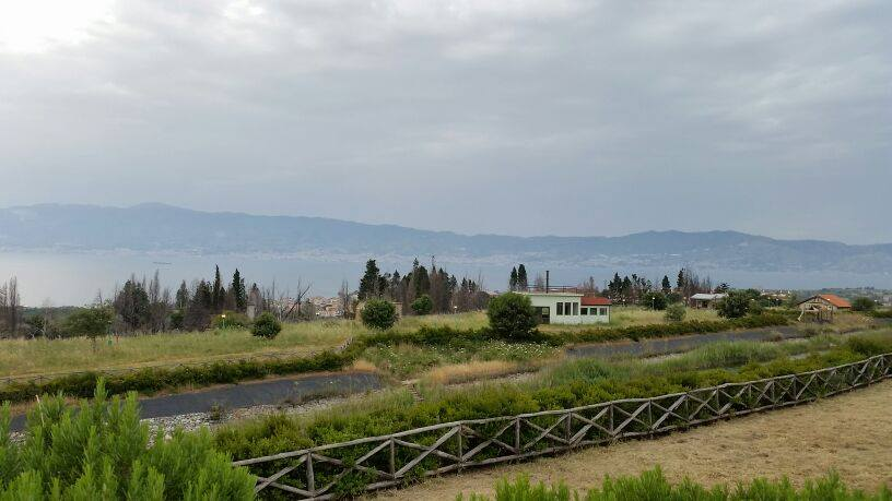 stretto